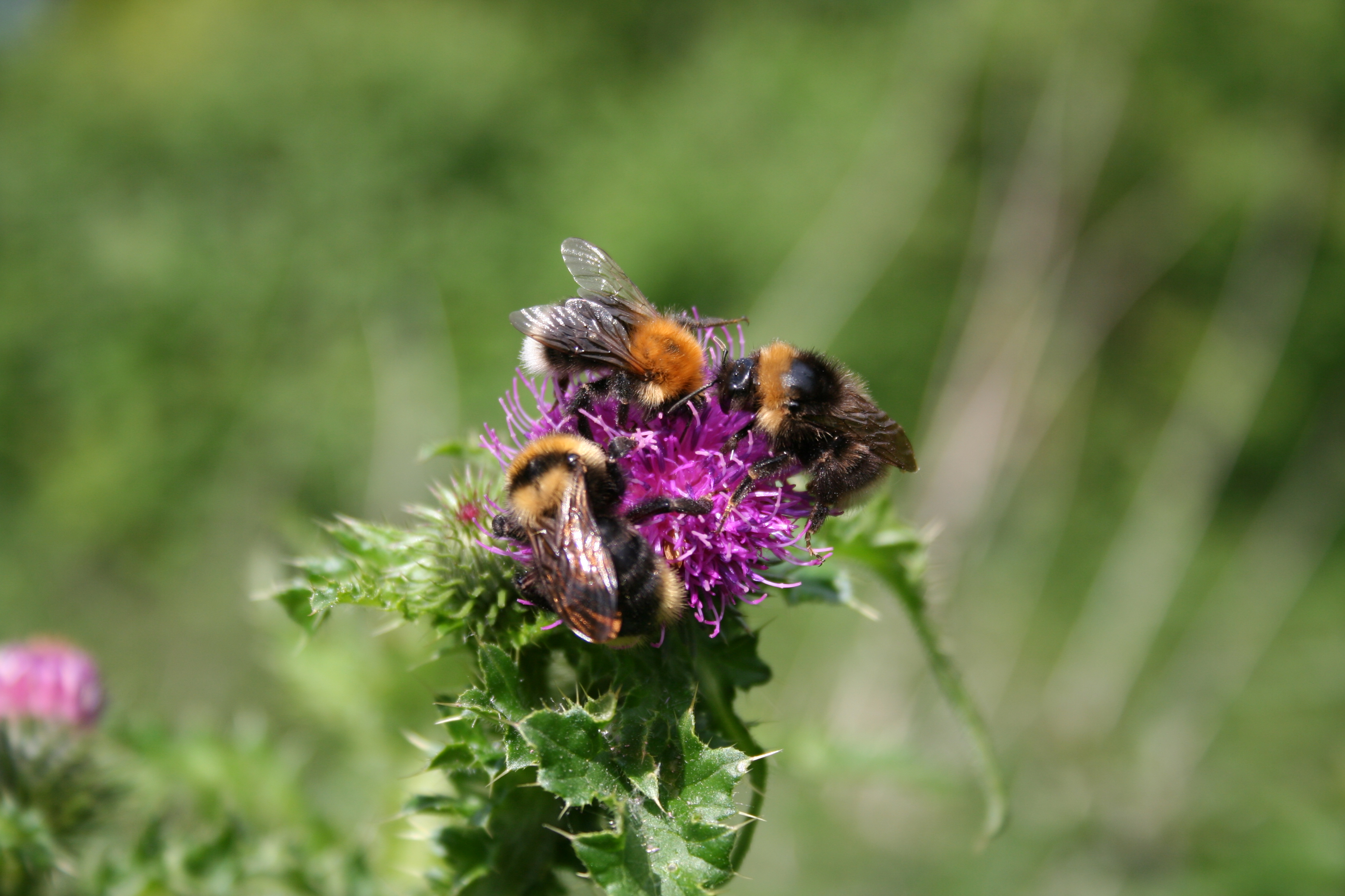 een mannetje Bombus terrestris aardhommel een werkster Bombus pratorum akkerhommel en een psythyrus koningin koekoekshommel